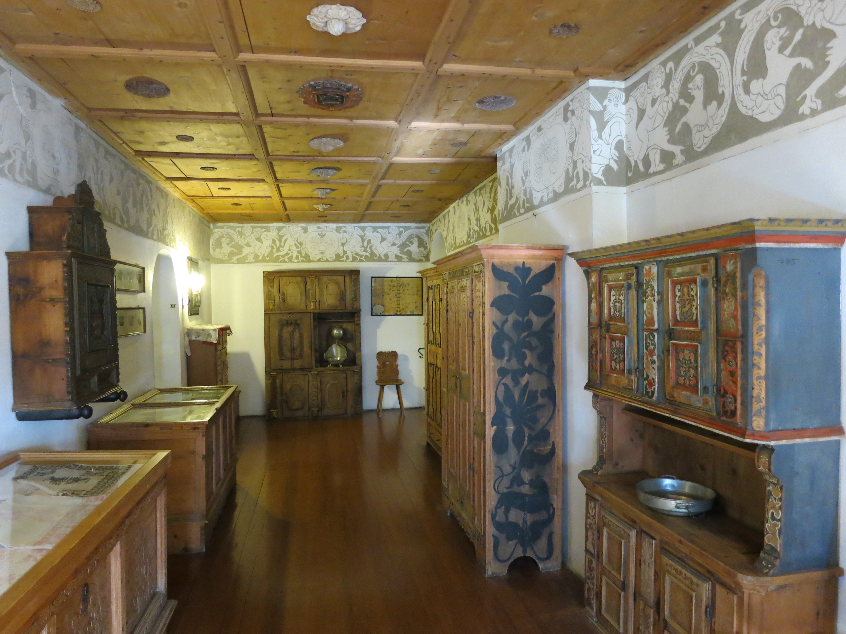 Plantahaus, Engadiner Museum, St. Moritz GR, Schweiz